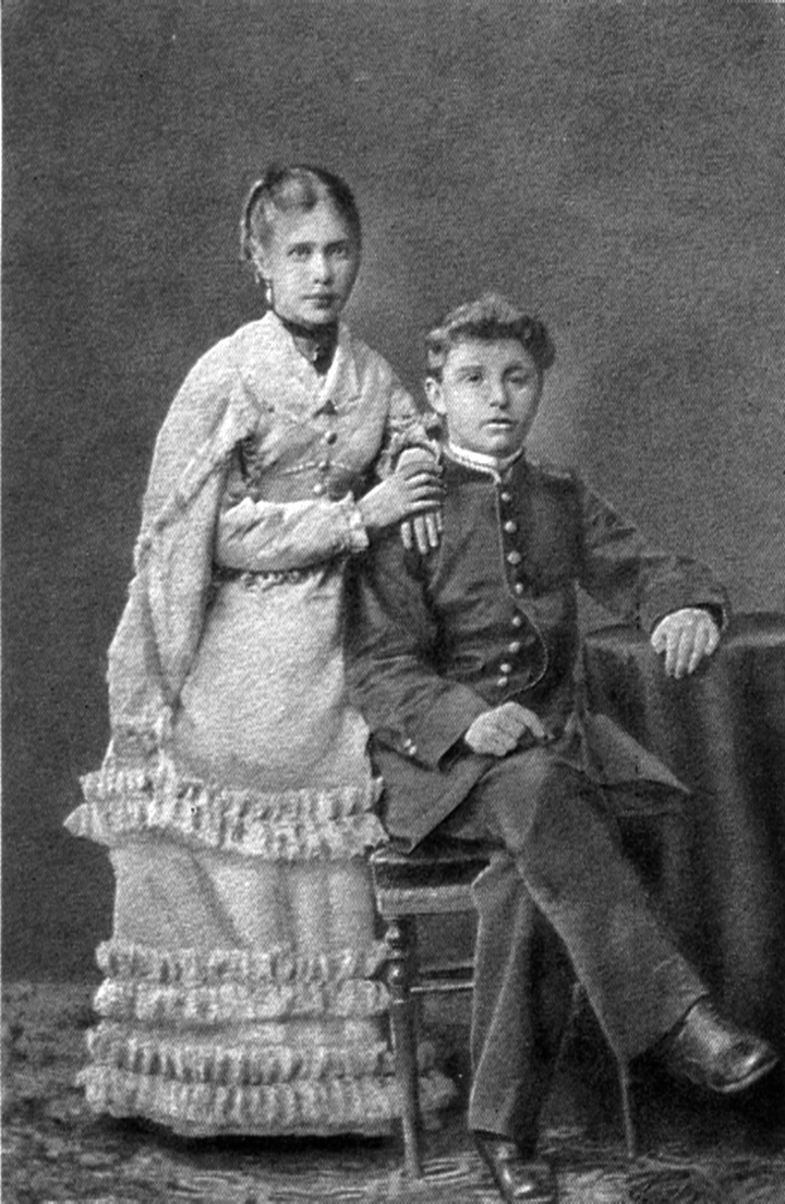 М.А. Врубель с сестрой Анной. Вероятно, 1870-е годы